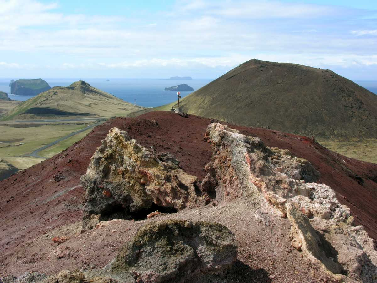 Vestmannaeyjar, Iceland